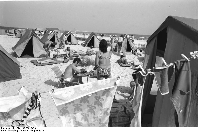 ADN-ZB/Spremberg/13.8.75/Bez. Rostock: Urlaub müßte man haben, und dann an der Ostsee sein, die mit ihrer ungewöhnlich hohen Temperatur von 20 bis 22 Grad immer noch das kühlste Gewässer der DDR ist. Den Zeltbewohnern in Prerow wurde es allerdings in den letzten Tagen etwas zu heiß in ihren Leinwandvillen.